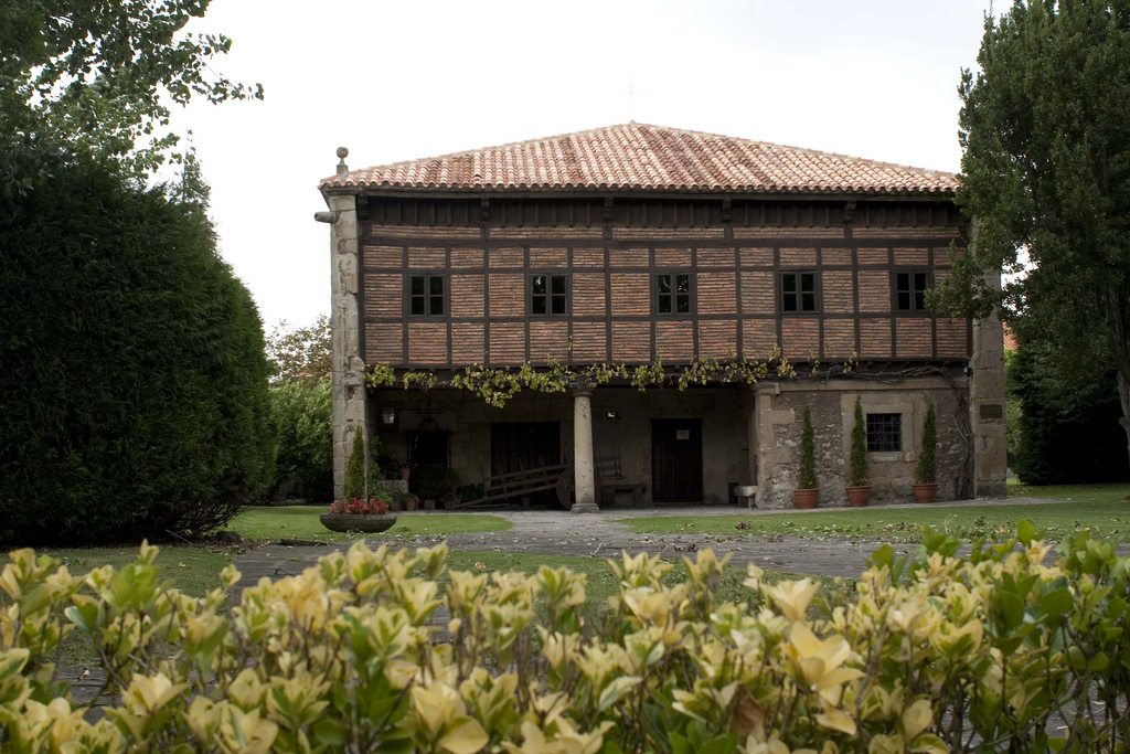 Museo Etnográfico de Cantabria